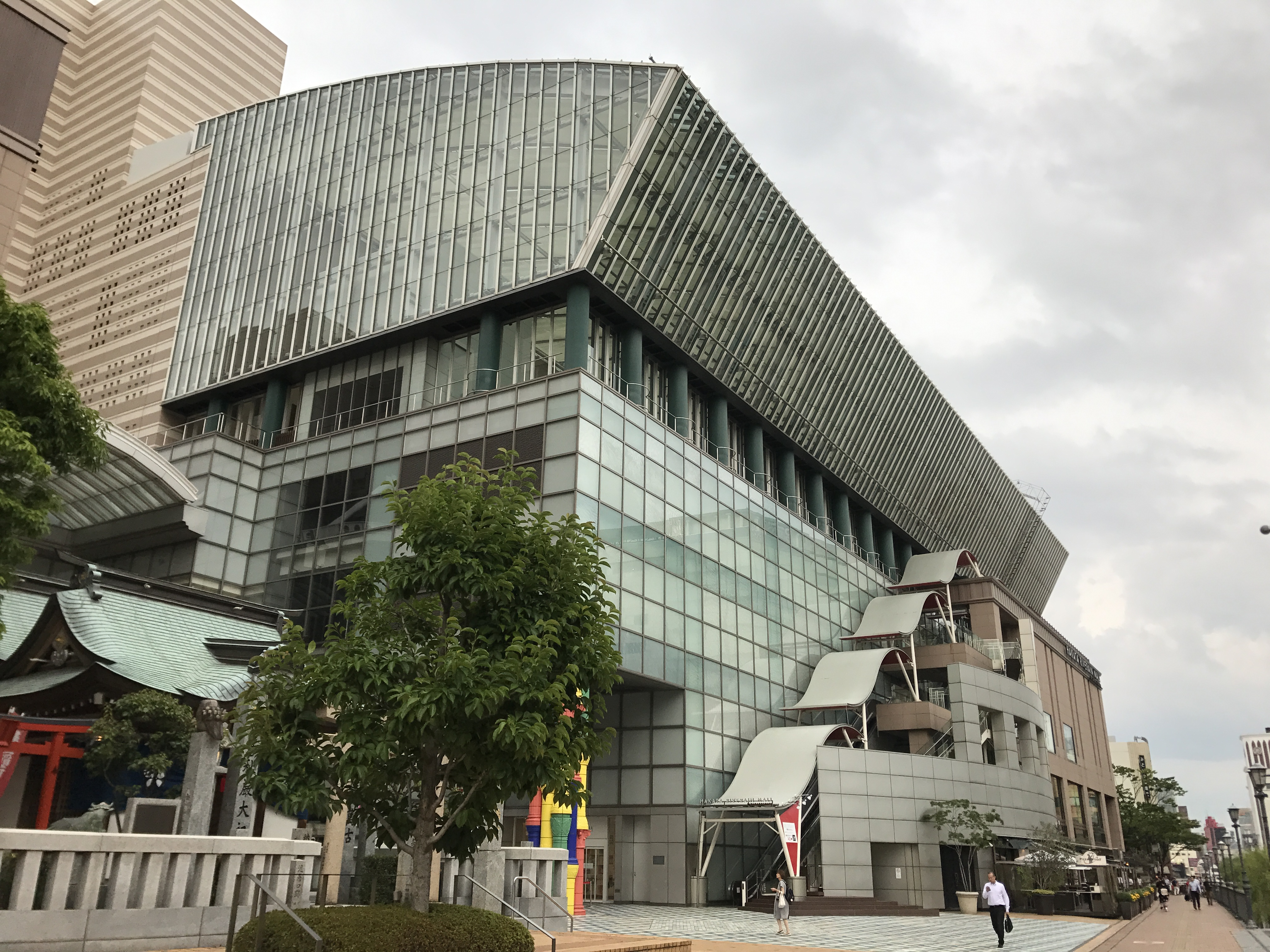 福岡アジア美術館